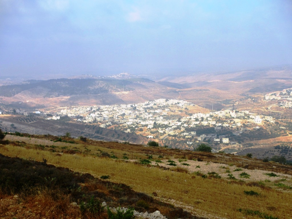 Nahalin